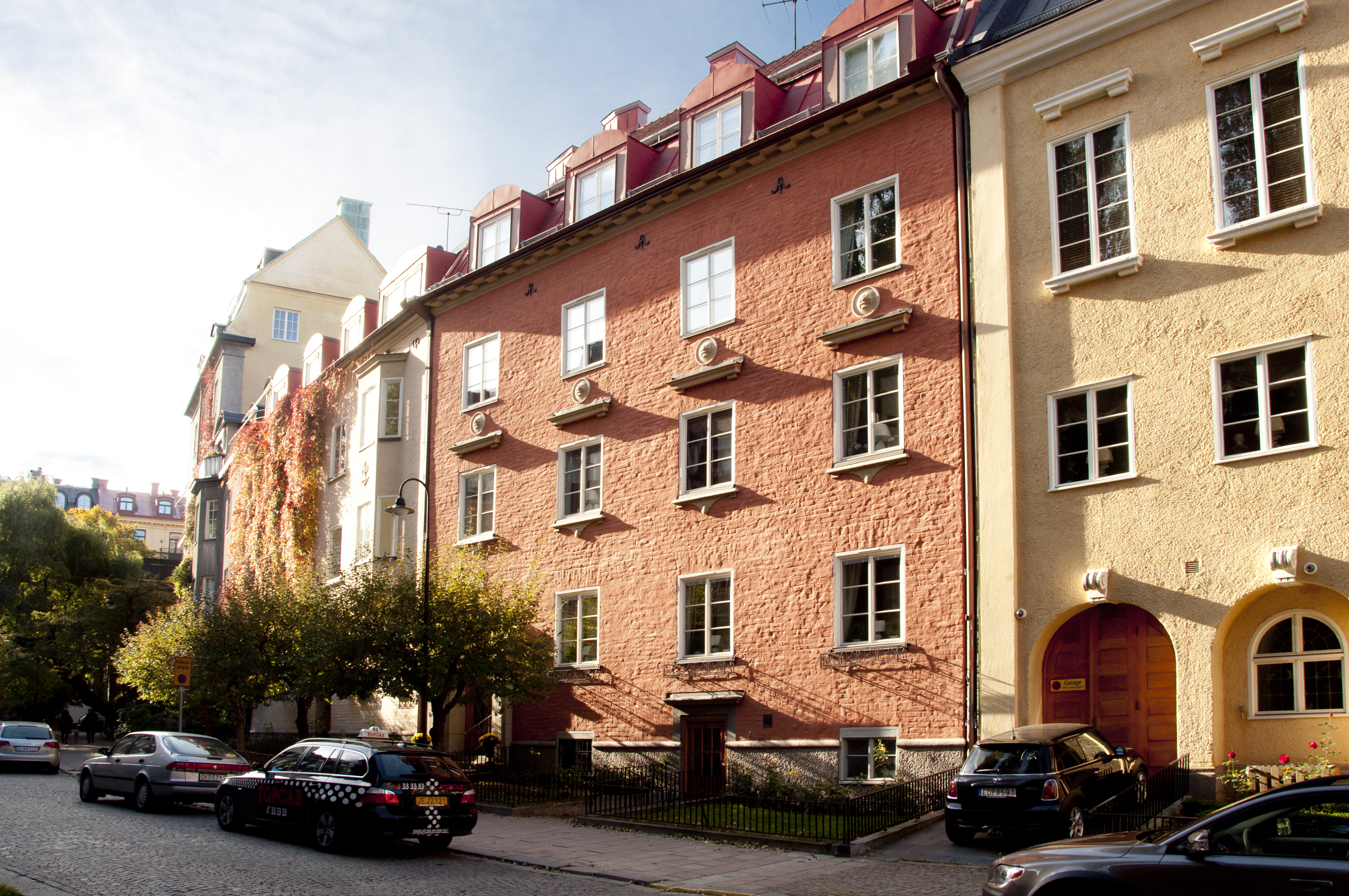 Tysta gatan 5. Byggnadsår 1922-25, arkitekt Fredrik Lidvall, byggherre och byggmästare A Johansson